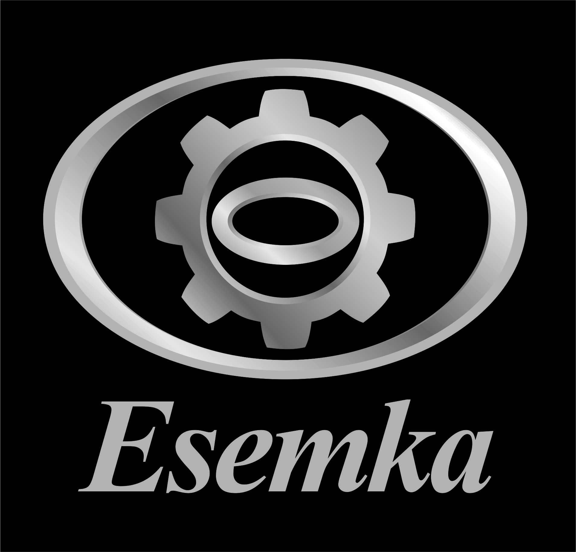 Logos Esemka